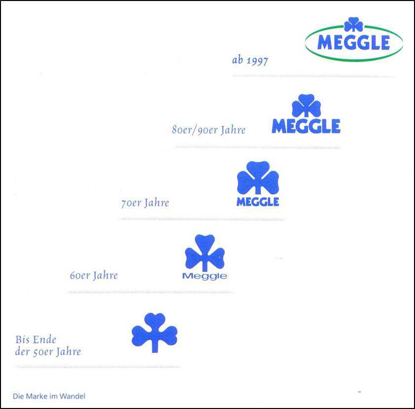 Das Markenzeichen MEGGLE im Wandel